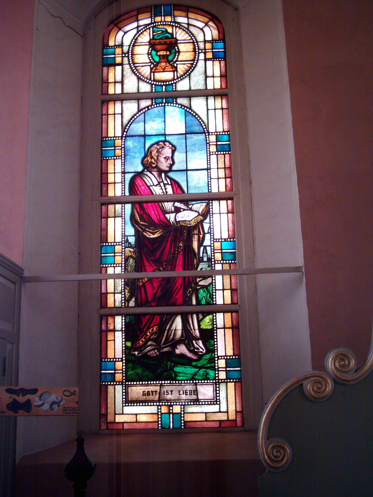 Johannes St. Nikolai Wittmund